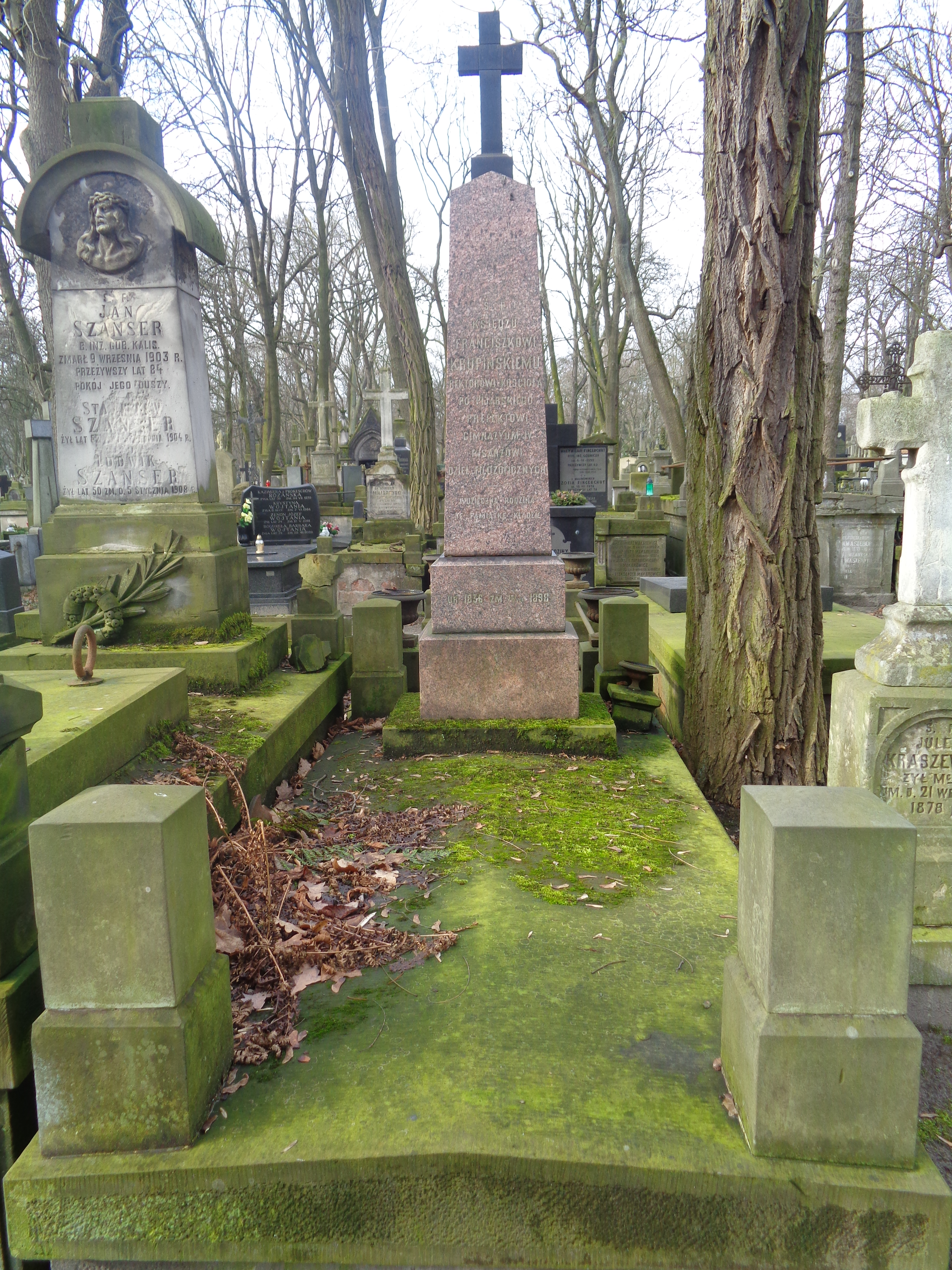 Grób Franciszka Krupińskiego na Cmentarzu Powązkowskim